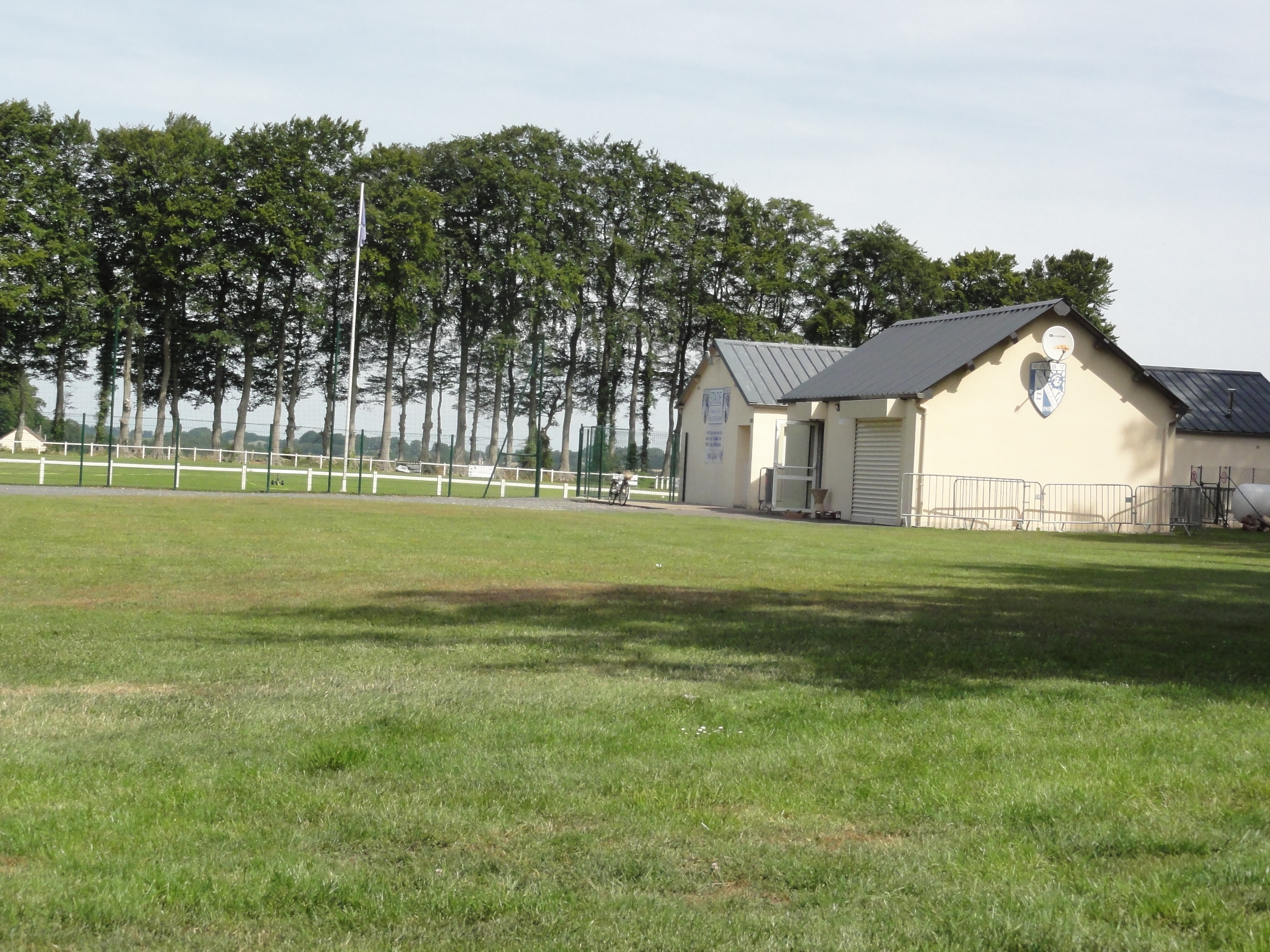 Ourville-en-Caux (Seine-Mar.) stade